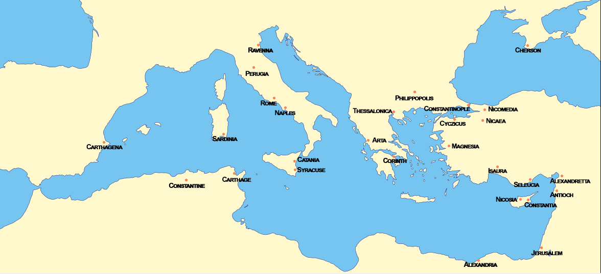 I. Justinianos döneminde Bizans İmparatorluğu darphaneleri.